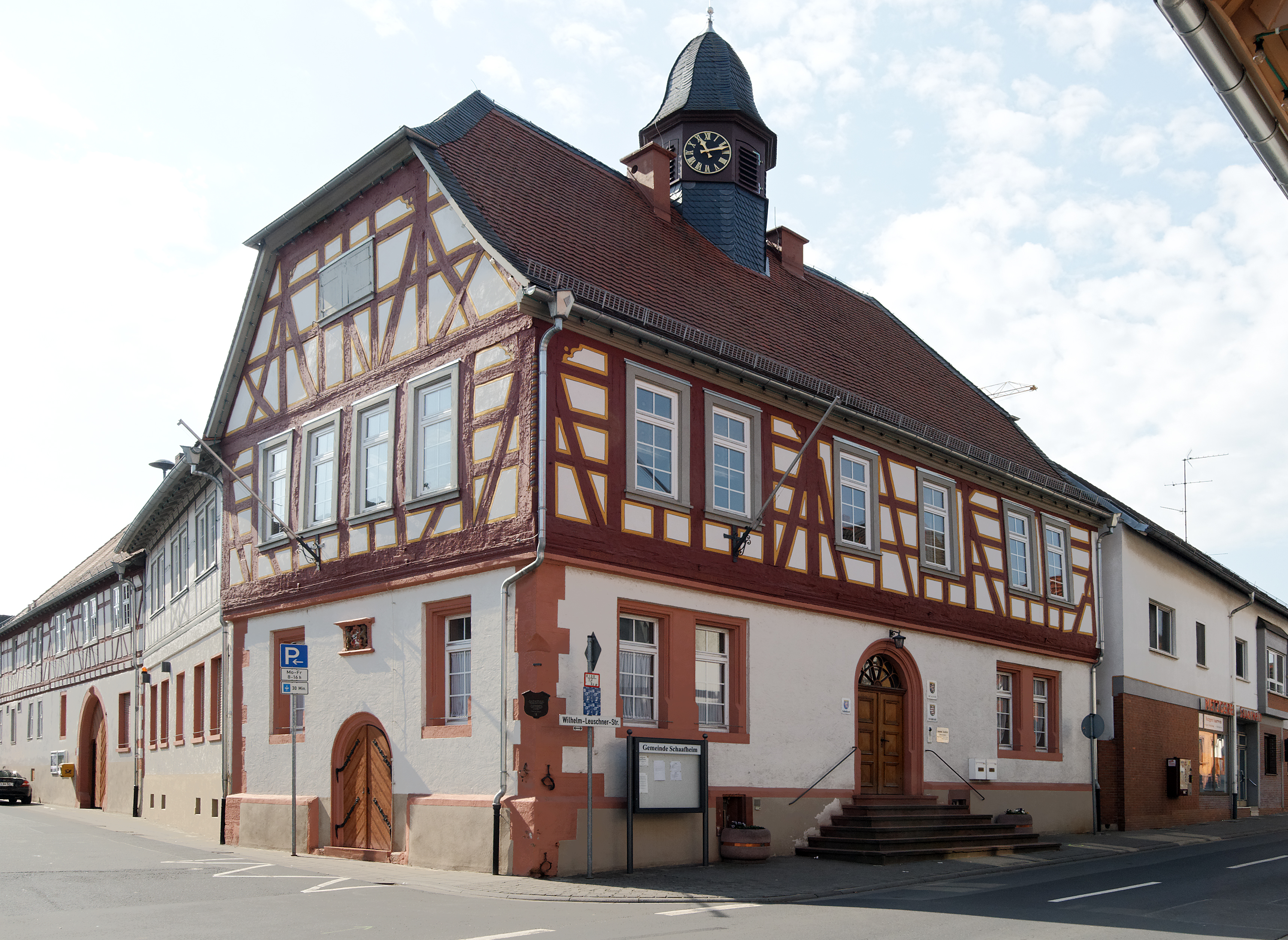 Rathaus in Schaafheim (Hessen). Eine Inschrift an der Schwelle enthält die Jahreszahl 1684.